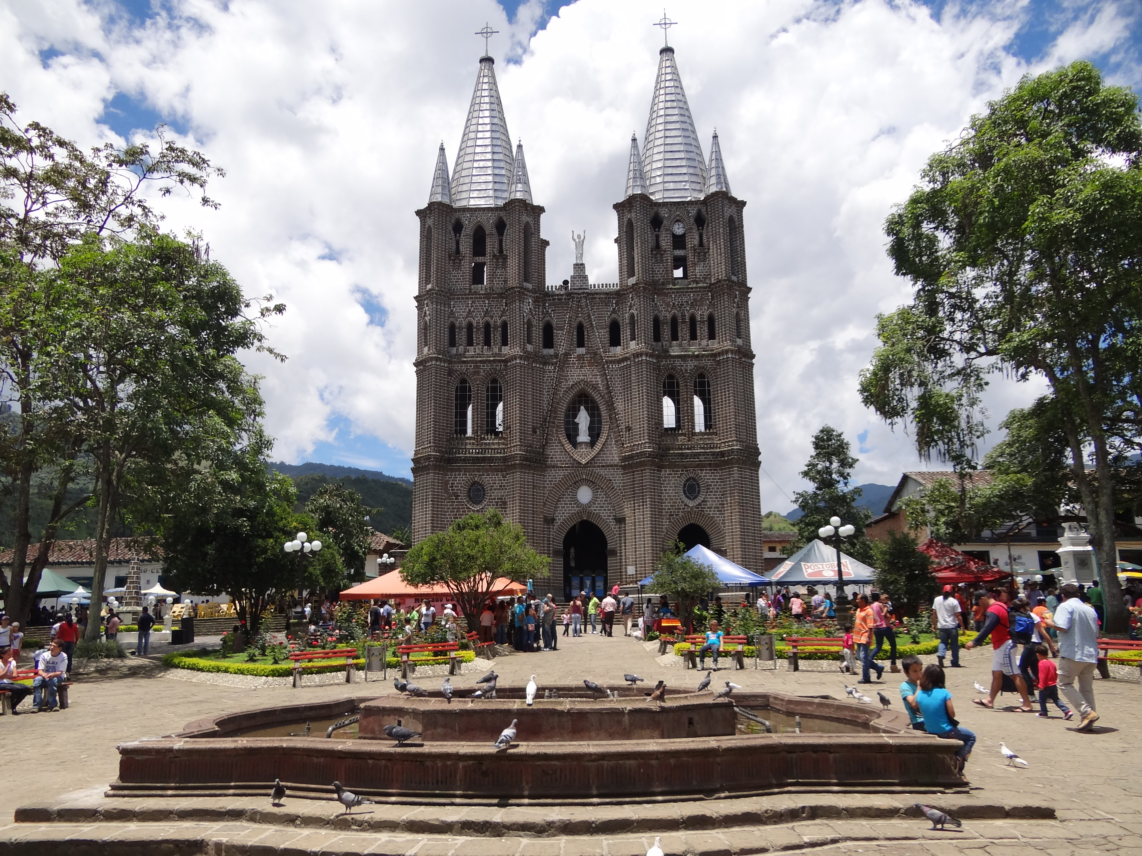 Vista frontal de la Basílica Menor de la Inmaculada Concepción. Foto tomada desde el extremo opuesto de la plaza principal. Em primer plano una fuente de agua.